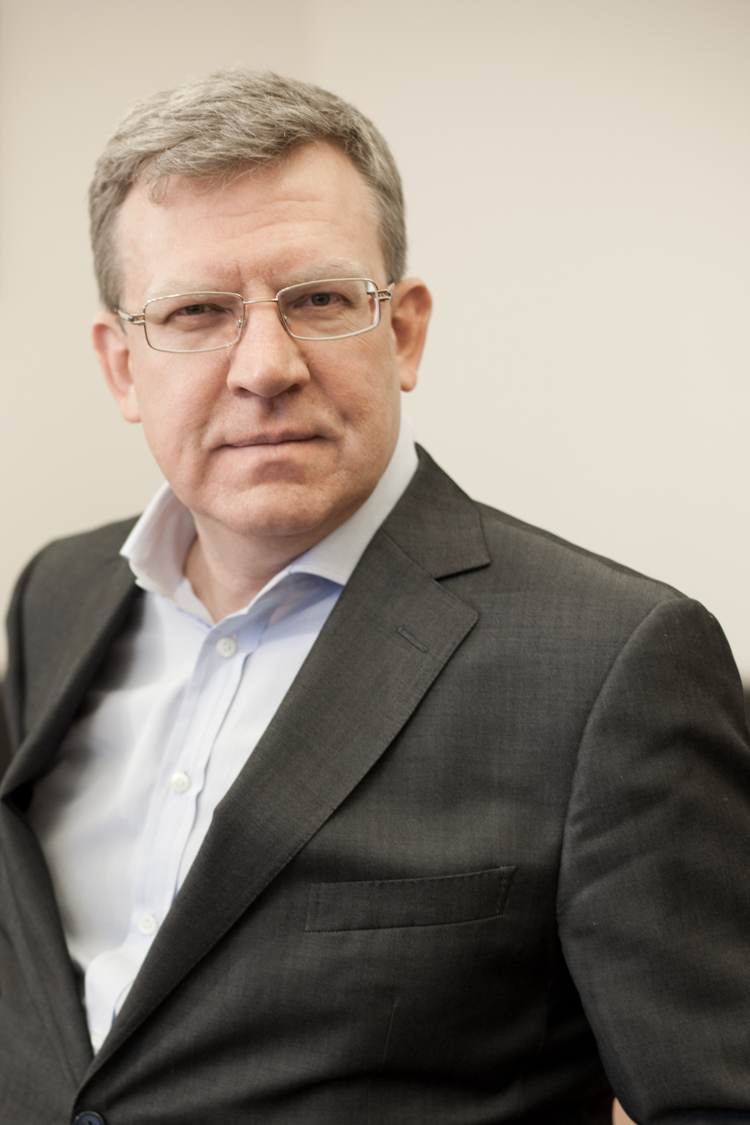 Алексей Кудрин, председатель Комитета гражданских инициатив, декан факультета свободных искусств и наук СПбГУ, бывший министр финансов РФ